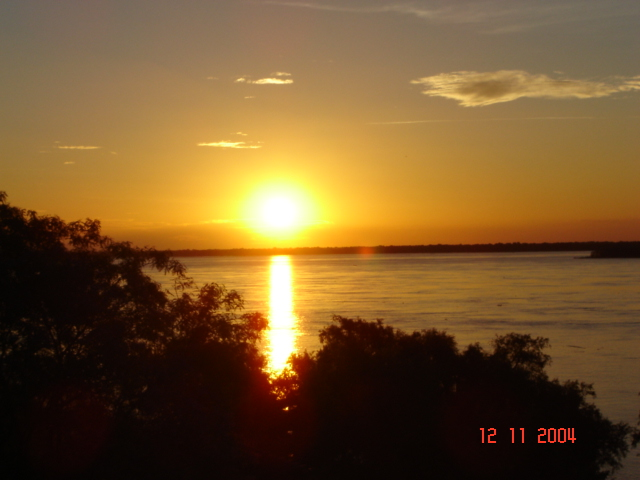 Atardecer sobre el Río Paraná visto desde la ciudad de La Paz, Entre Ríos, Argentina.